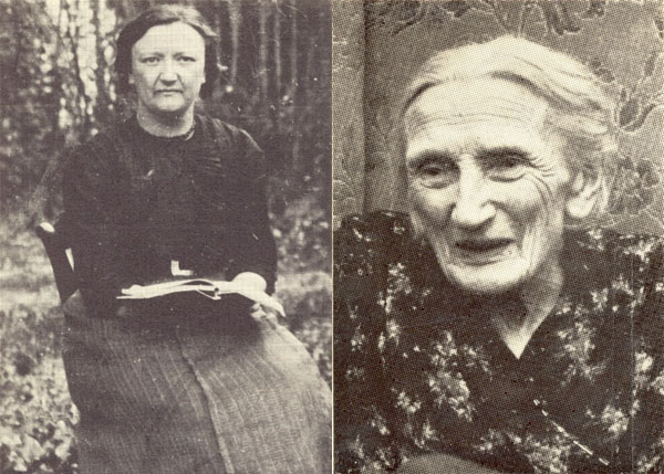 Foto's van de wijlen Johanna van Buren